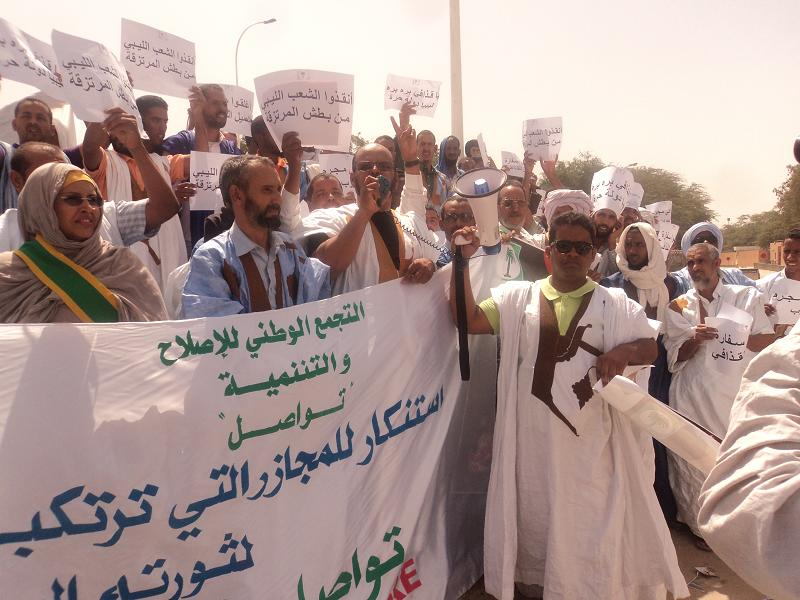 [Bakari Gueye] Protestors with Mauritania's Tawassoul party express support for Libya's people. المتظاهرون مع حزب تواصل الموريتاني يعبرون عن تأييدهم للشعب الليبي Les manifestants du parti Tawassoul de Mauritanie expriment leur soutien au peuple libyen. Full story: القصة L'article